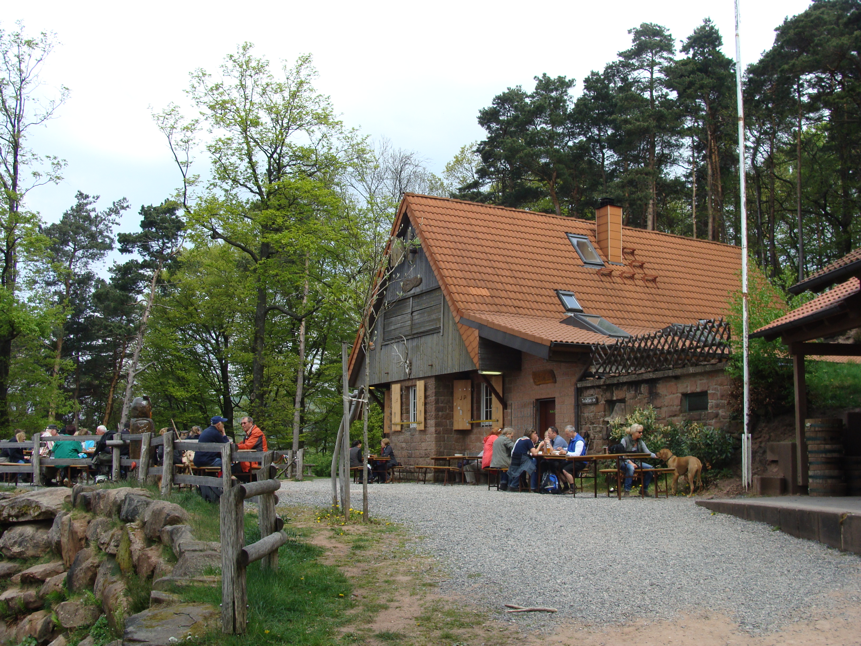 Jung-Pfalz-Hütte bei Annweiler (Wasgau)